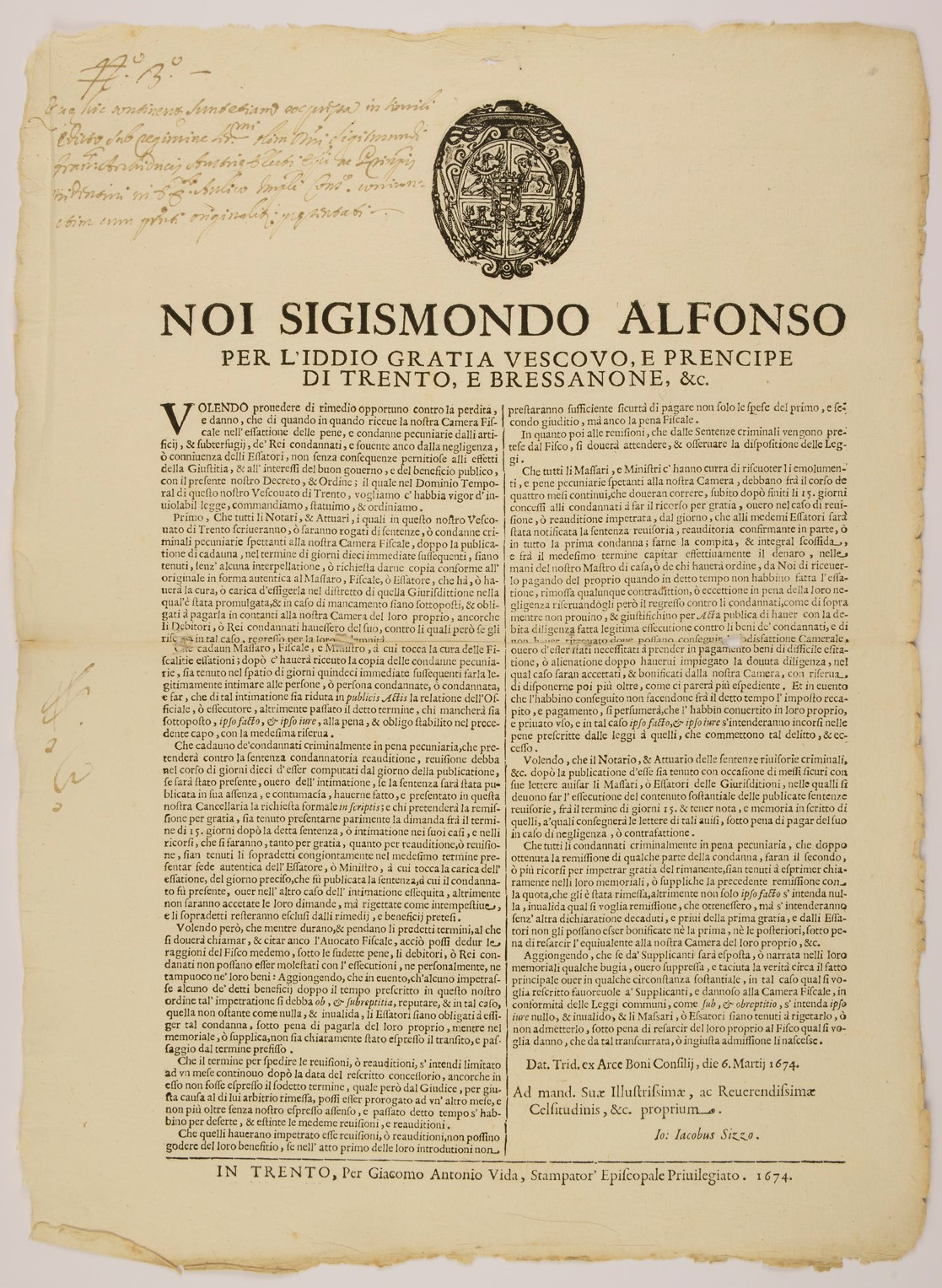 Proclama.